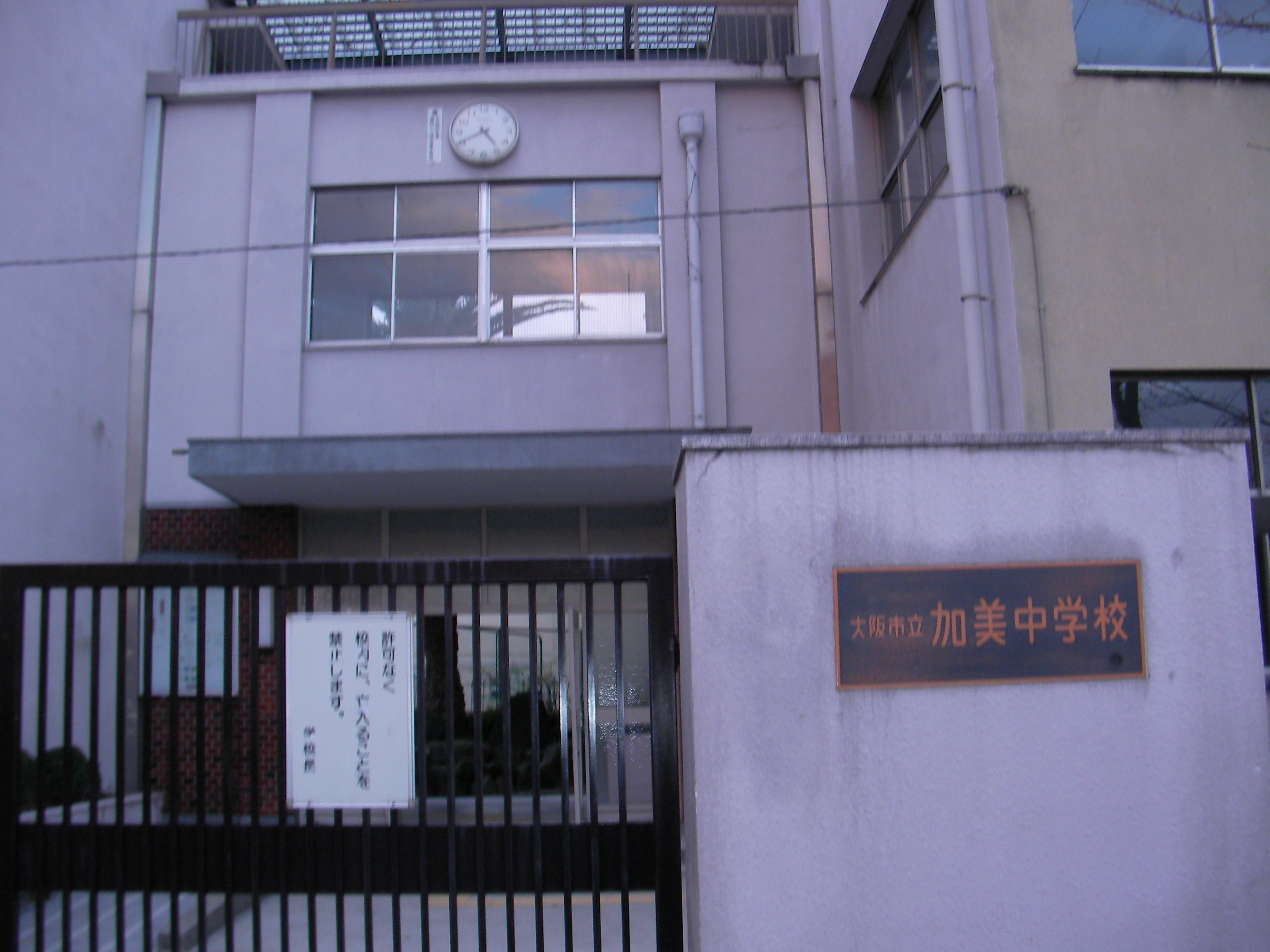 大阪市立加美中学校